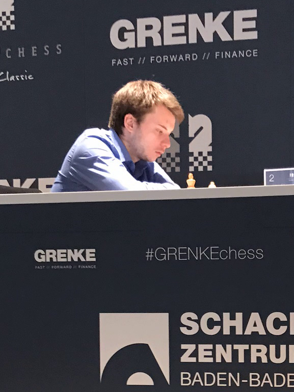 Aleksey Goganov, Runde 8 der Grenke Chess Open 2019 in Karlsruhe.